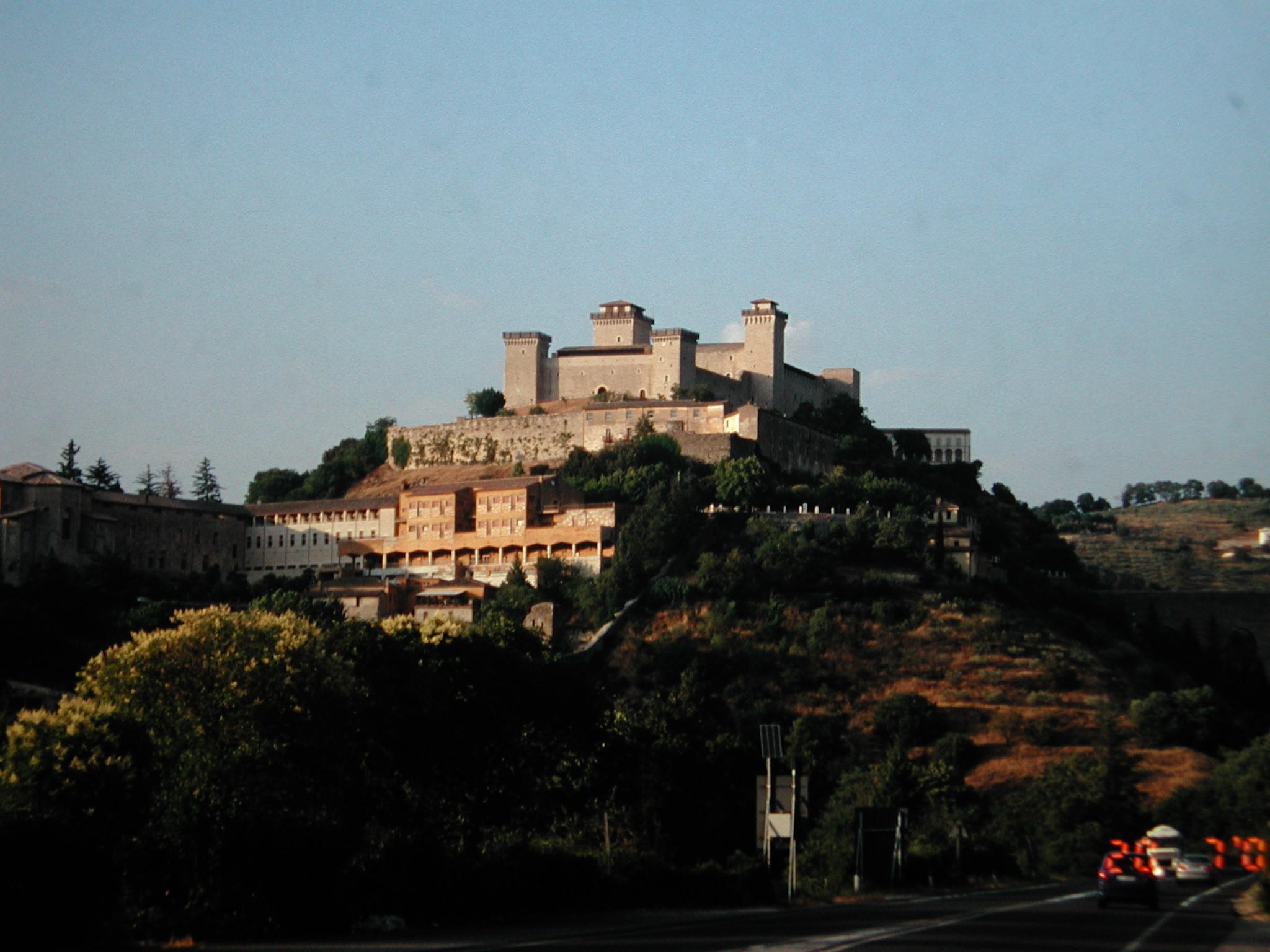 Spoleto, Italie Categorie:Wikipedia:Afbeeldingen/Gebruiker:P.H. Louw